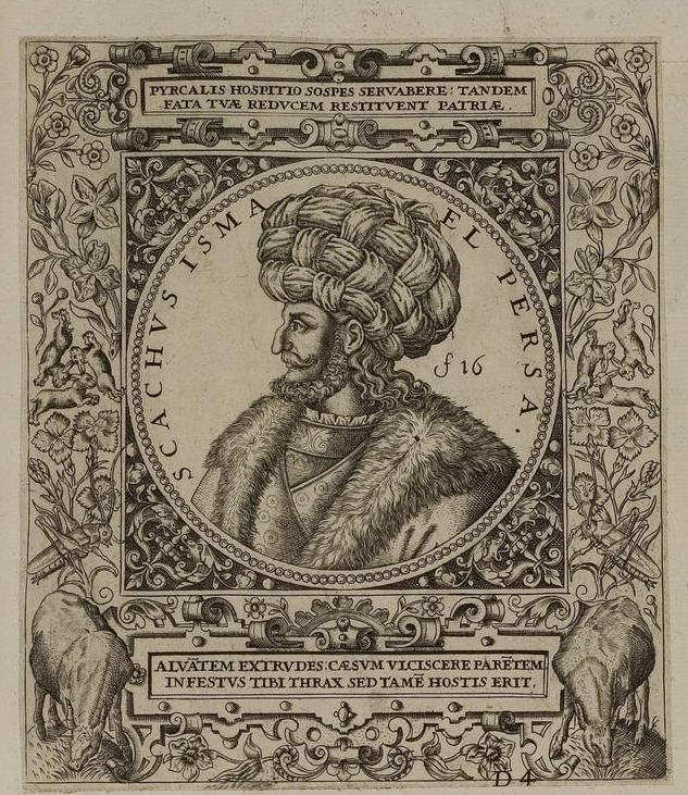 Grafik aus dem Klebeband Nr. 1 der Fürstlich Waldeckschen Hofbibliothek Arolsen Illustration aus: Georg Greblinger: Wahre Abbildungen der Türckischen Kayser vnd Persischen Fürsten / so wol auch anderer Helden und Heldinnen von dem Osman / biß auf den andern Mahomet. Johann Ammon, Frankfurt 1648 Motiv: "Schachus Ismael Persa" (Schah Ismail I.)